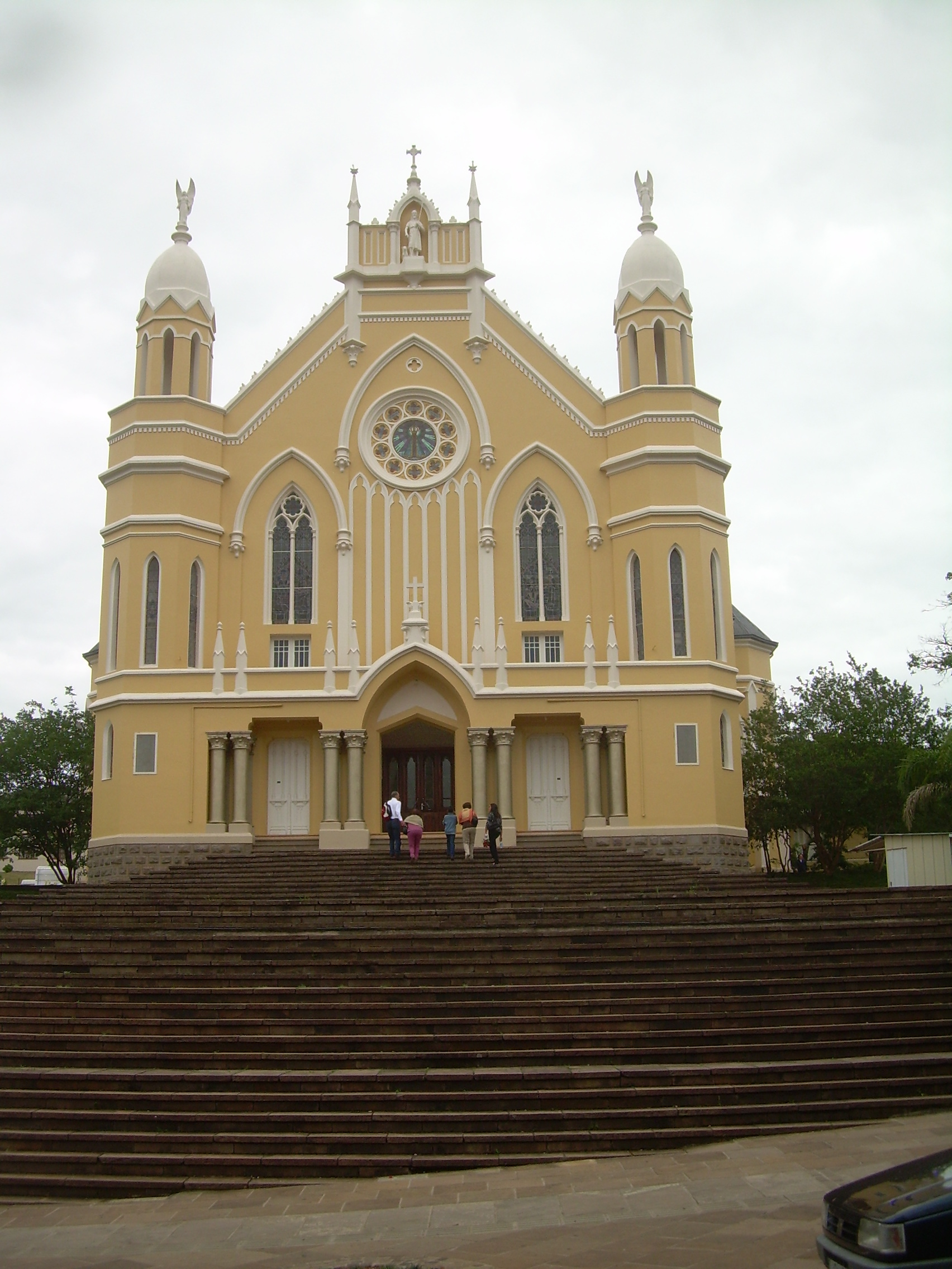 Iglesia matriz San Juan Bautista de Nova Prata.